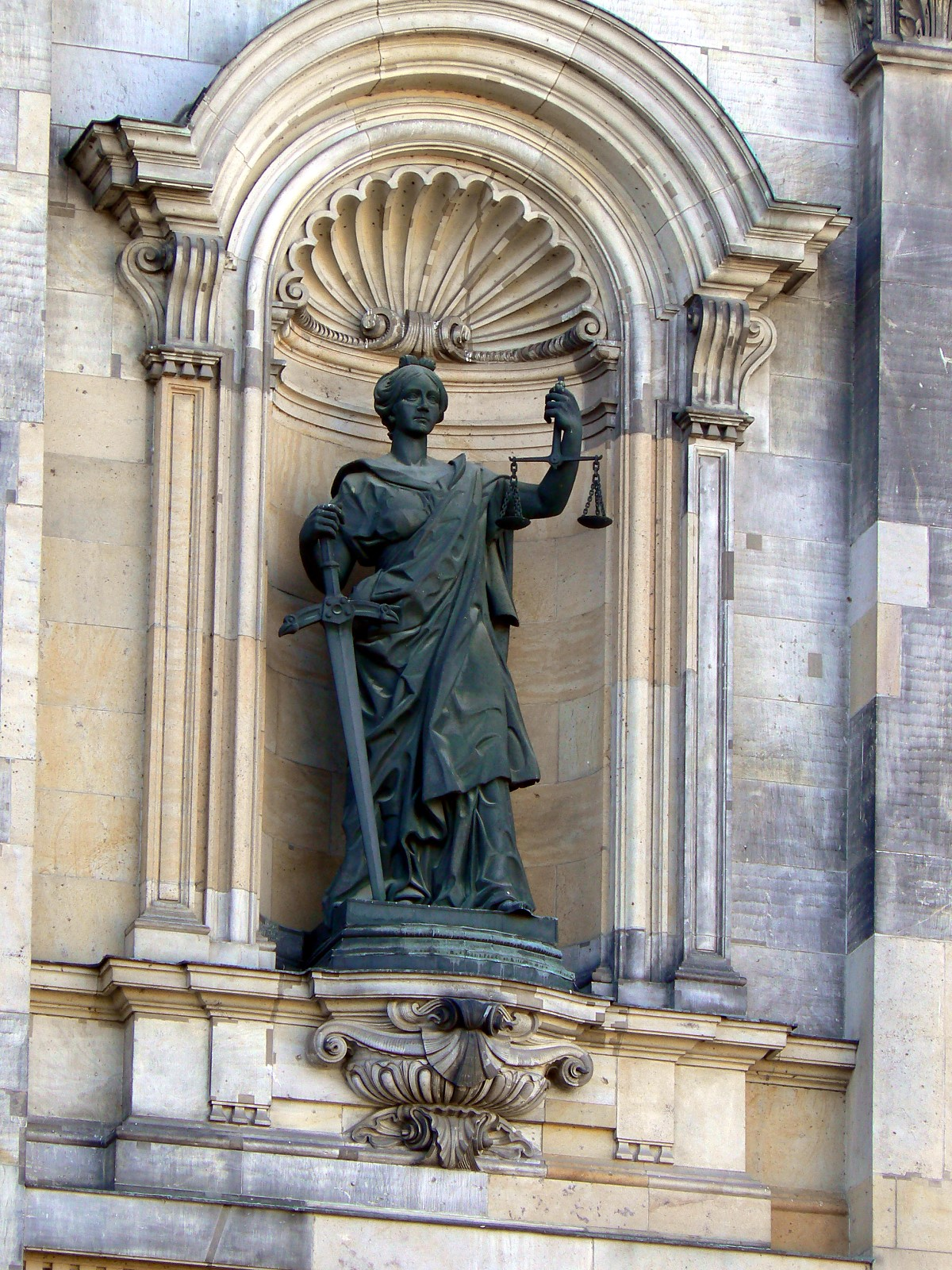 Detailaufnahme an der Ostseite des Berliner Doms: Skulptur Gerechtigkeit nach Max Baumann.